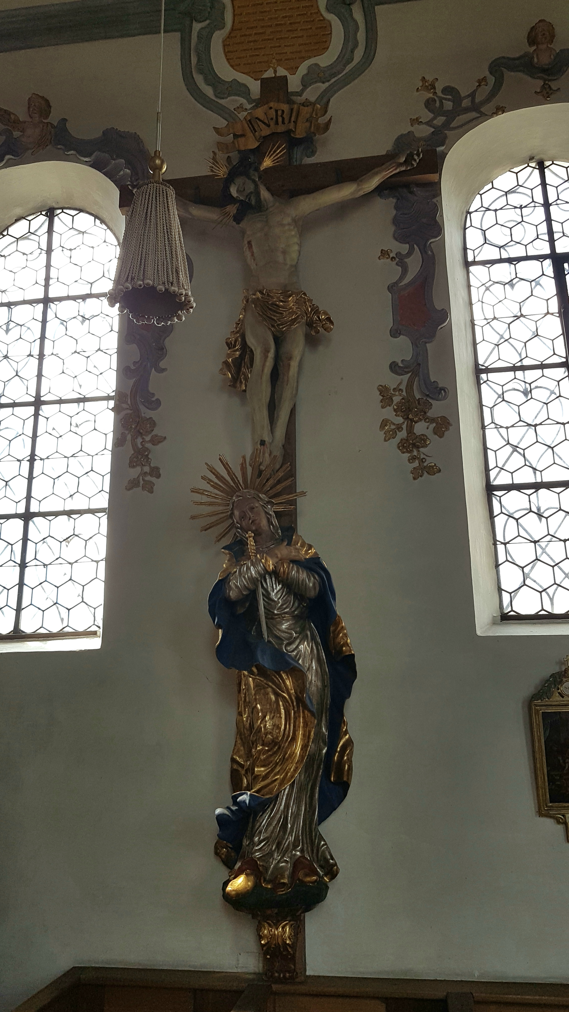 Oberfinning (Gmde Finning), Pfarrkirche Hl. Kreuz, spätbarockes Kruzifix (1715/20), ein ausdrucksstarkes Hauptwerk von Johann Luidl.